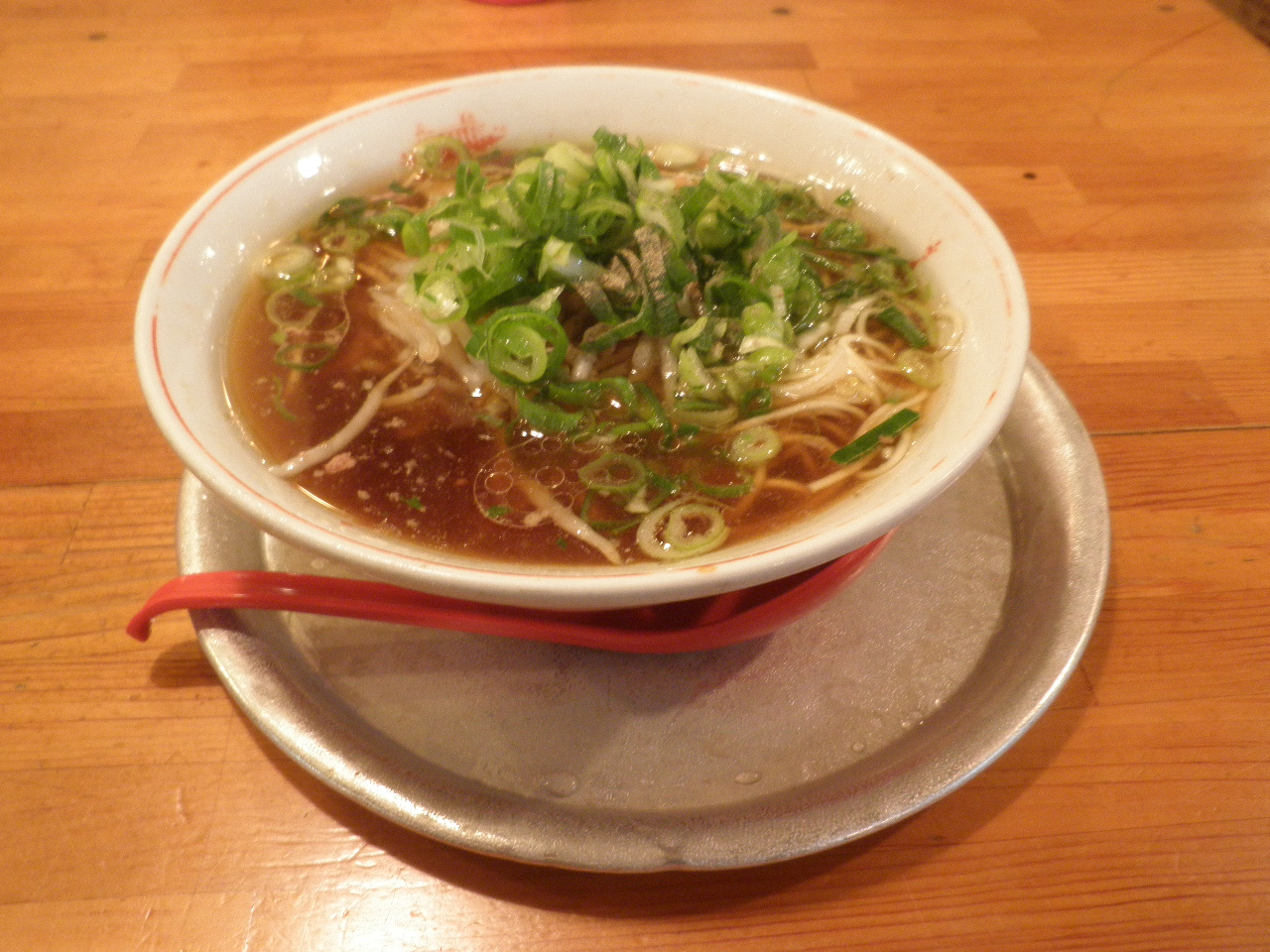 神戸ラーメン第一旭のAラーメン